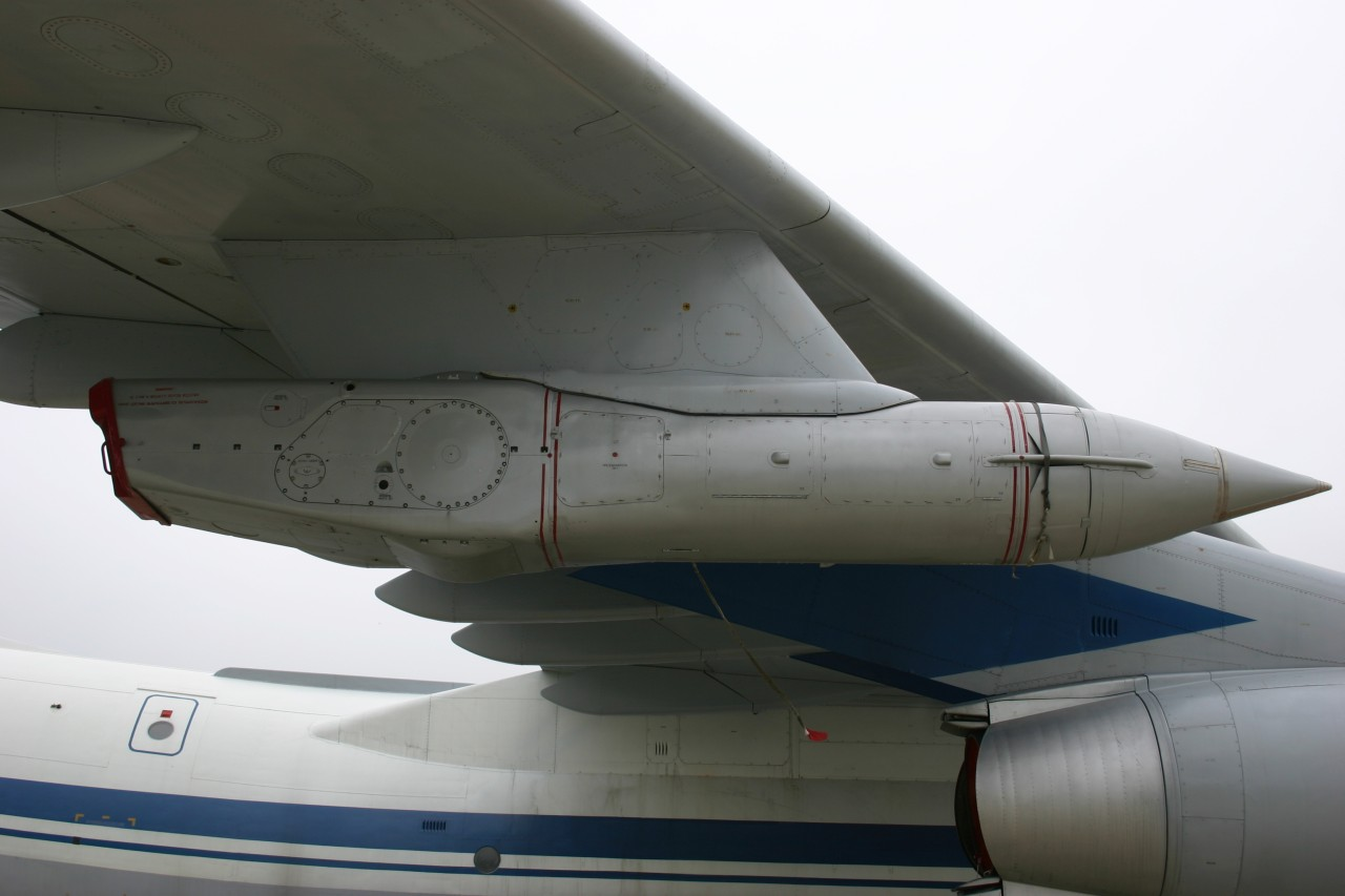 УПАЗ-1 под крылом Ил-78